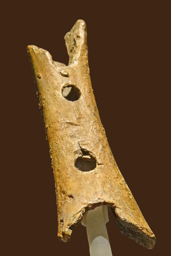 Ce morceau de fémur d'un ours trouvé en 1995 dans la grotte de Divje Babe (Alpes) est percé de deux trous, ce qui a été interprété par les archéologues comme la partie d'une flûte fabriquée par un homme de Néandertal La couche archéologique, dans laquelle a été découvert cet os percé, date de 55.000 ans (fin du paléolithique moyen, ) comme l'ont affirmé les archéologues slovènes à partir de mesures radiométriques. Cet "flûte" serait donc à l'heure actuelle le plus vieil instrument de musique du monde. Les trésors du musée national de Slovénie "En 1995, Ivan Turk découvre un fémur percé appartenant à un jeune ours des cavernes, daté de 43 100 ± 700 ans BP9. À cause de sa ressemblance avec une flûte, il lui donne le nom de « flûte néandertalienne ». Le fait que ce soit réellement une flûte fabriquée par l'homme de Néandertal fait l'objet de discussions scientifiques." Extrait de l'article de Wikipedia sur la flûte